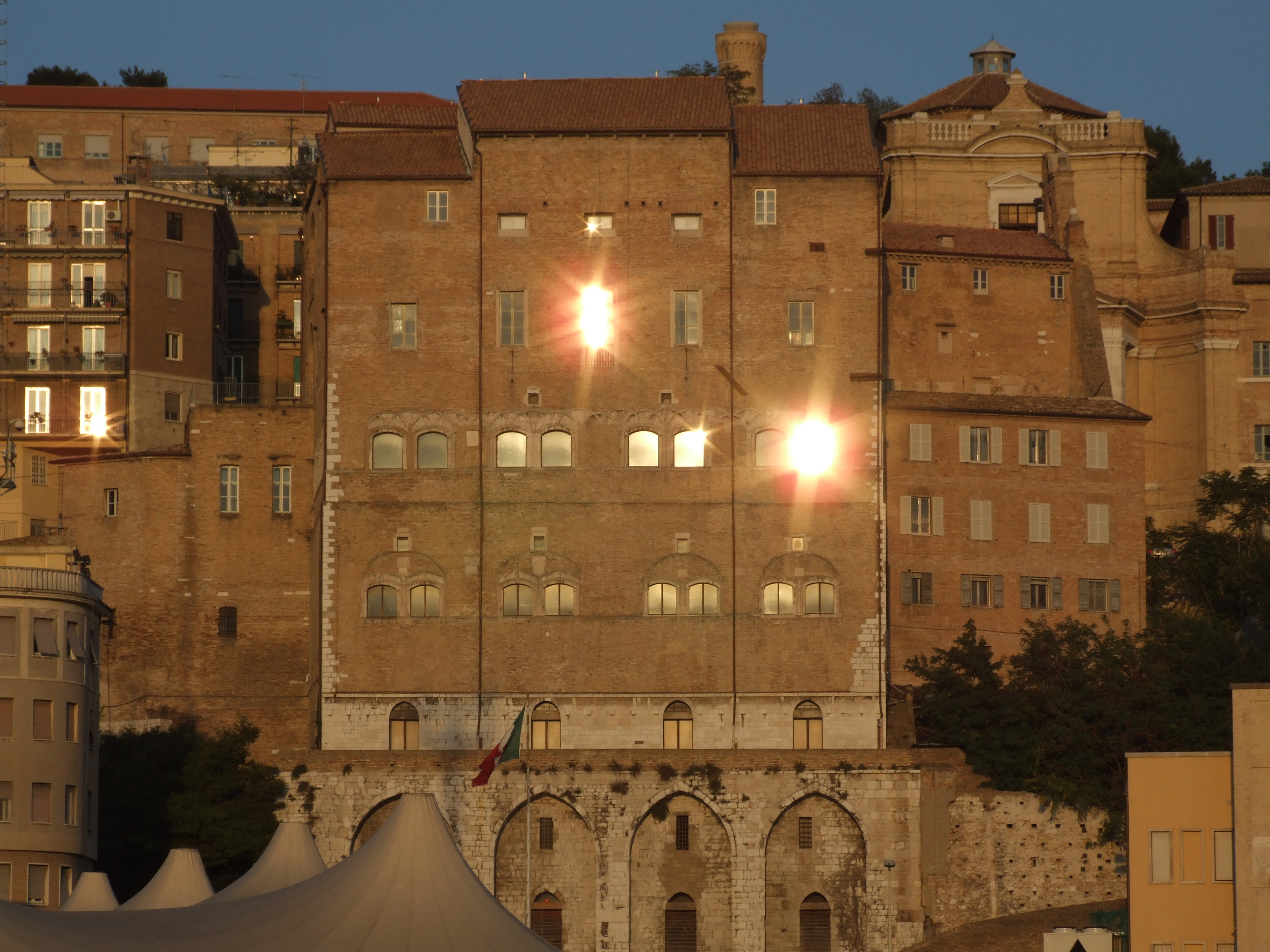 Palazzo degli Anziani dal molo Wojtyla This is a photo of a monument which is part of cultural heritage of Italy.